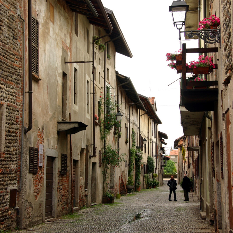 Scorcio del ricetto di Ghemme (NO)